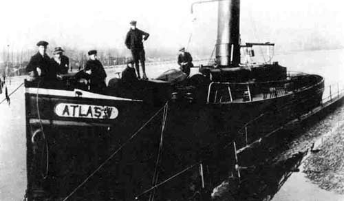 ATLAS V tugboat in Eysden